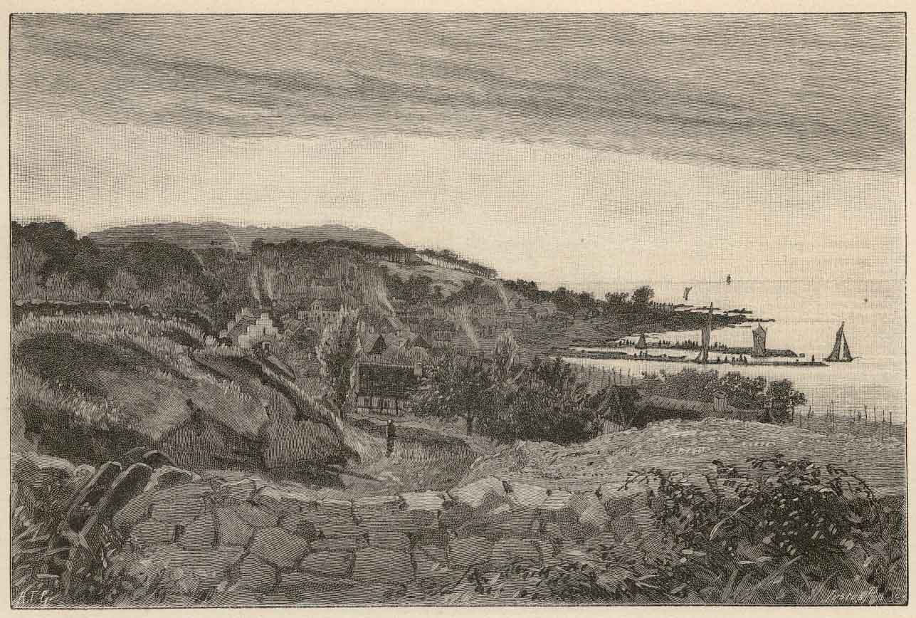 Arild